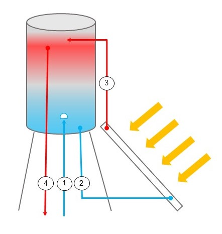 תרשים דוד שמש